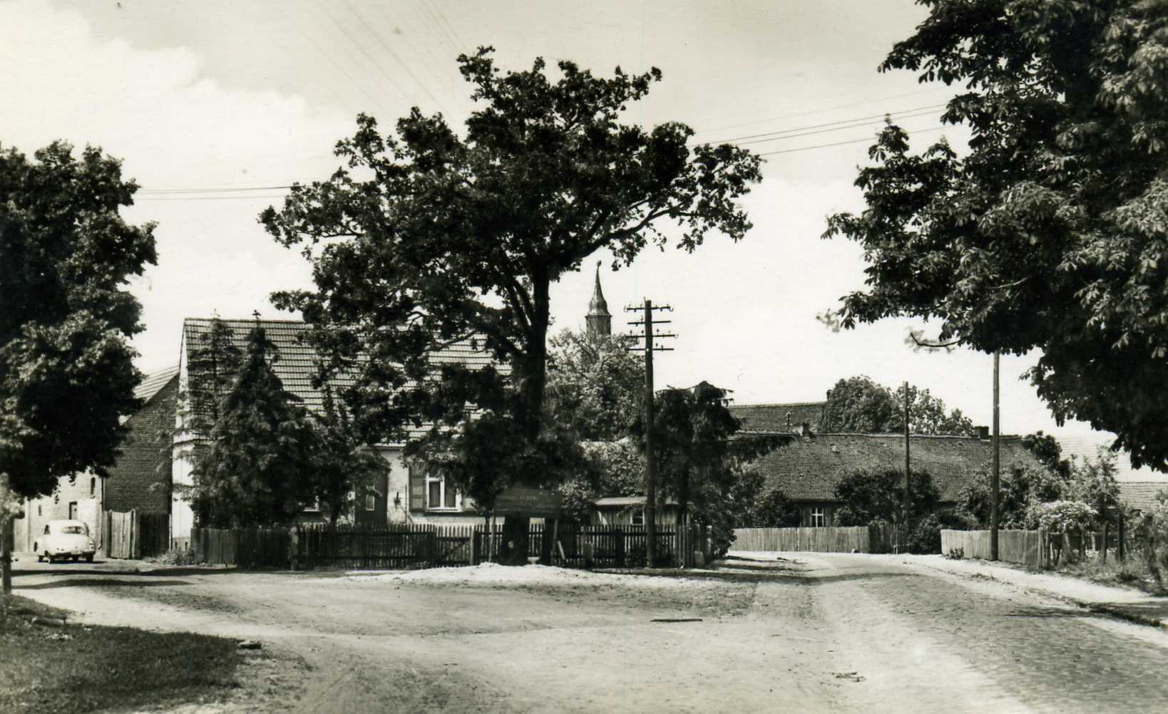 Pollitz Orstmitte